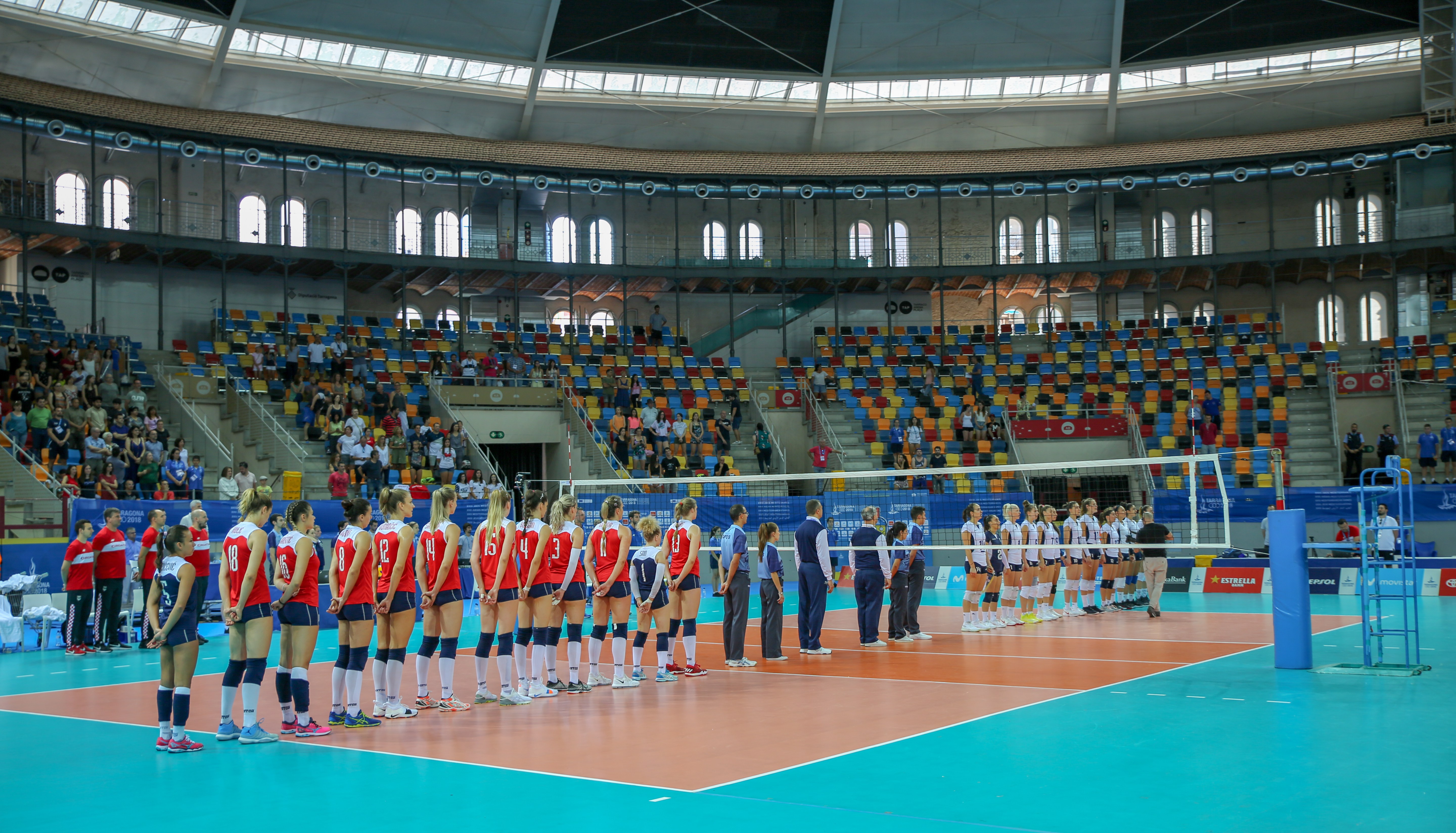 Final femenina - Juegos del Mediterráneo 2018